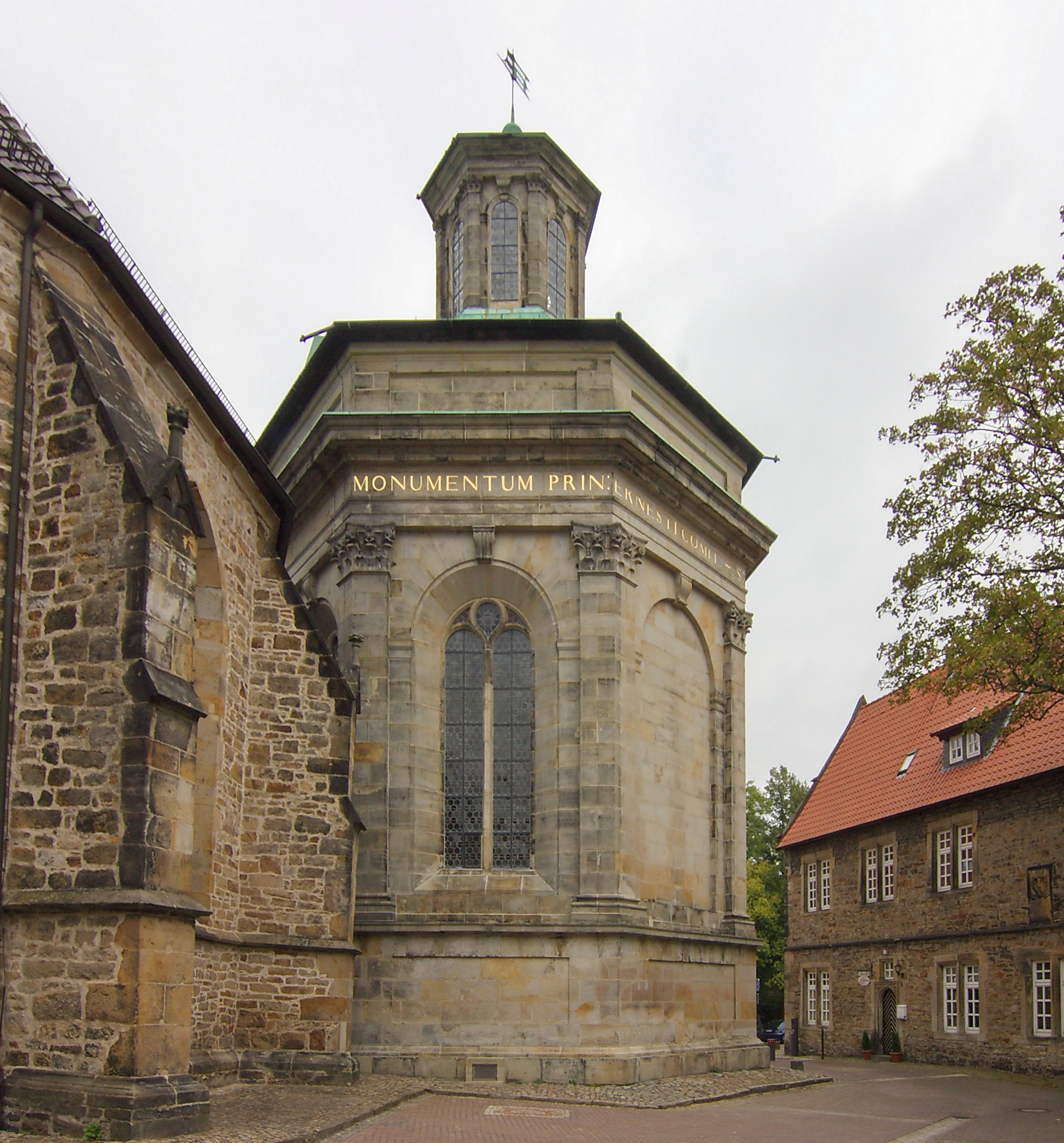 Das Mausoleum des Fürsten Ernst zu Holstein-Schaumburg in Stadthagen, Niedersachsen, Deutschland, erbaut 1620-27